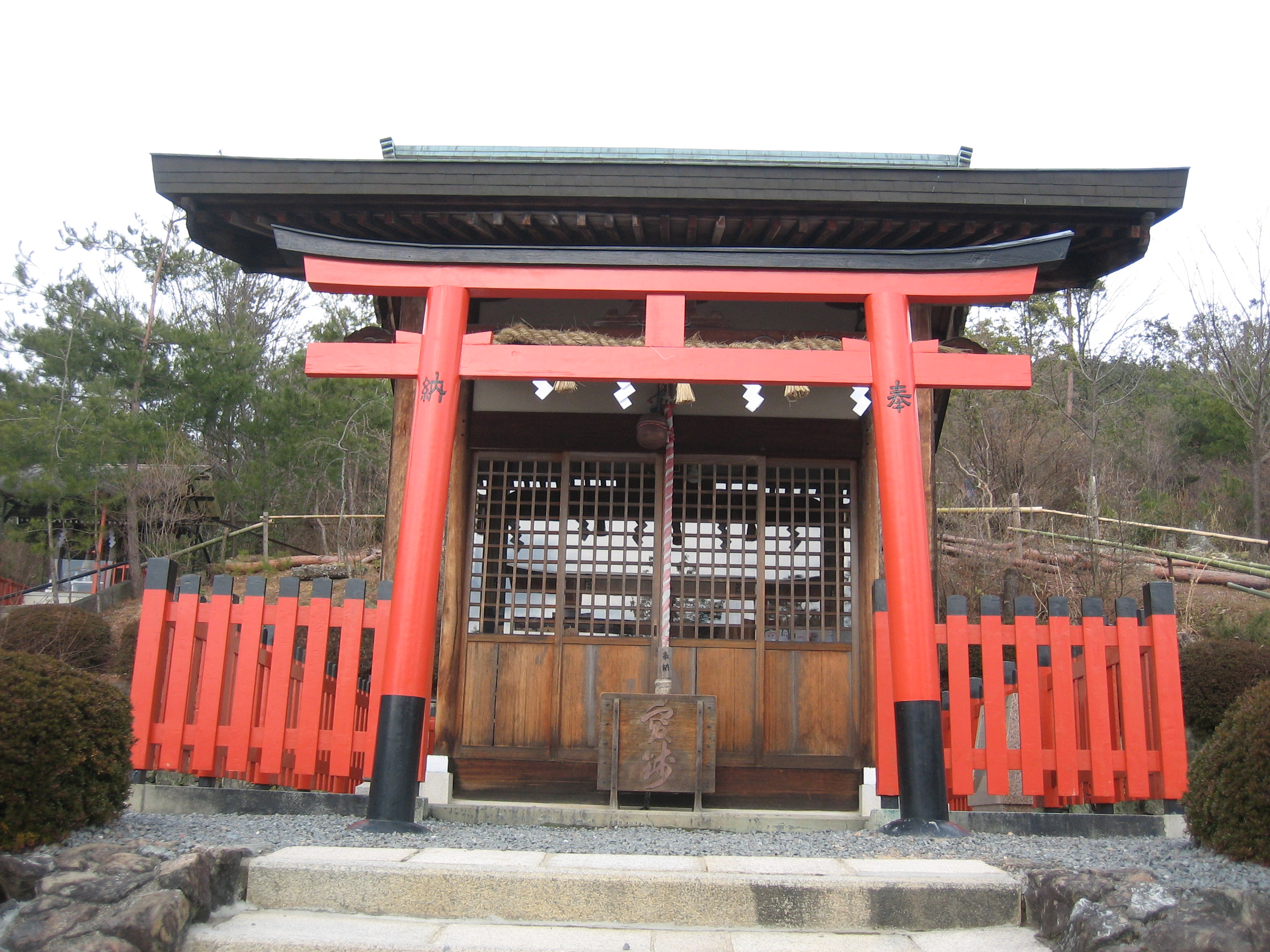 京都市北区大北山原谷乾町から原谷弁財天本殿を撮影